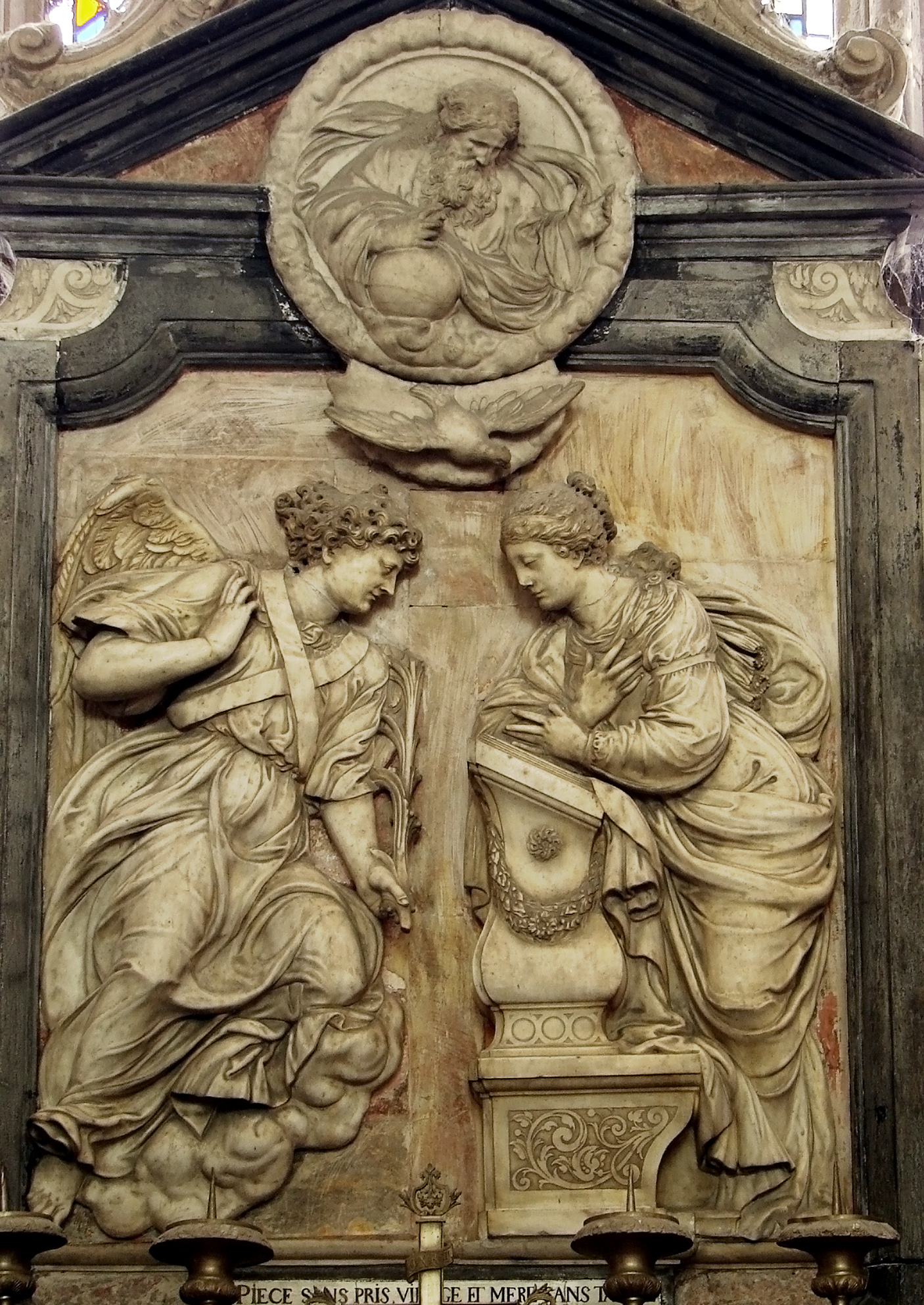 Chapelle de l'Annonciation, retable en marbre par Nicolas Blasset, 1655, dans la cathédrale d'Amiens.